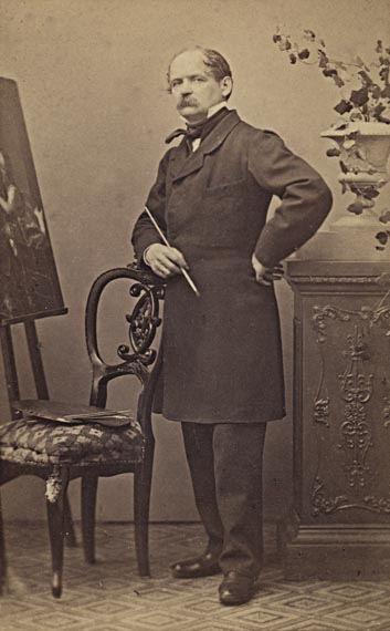 Antonín Dvořák (1817 - 1881), Český malíř a fotograf.